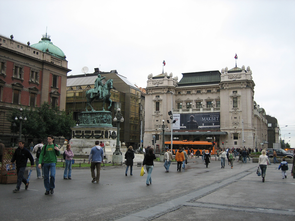 La place de la République